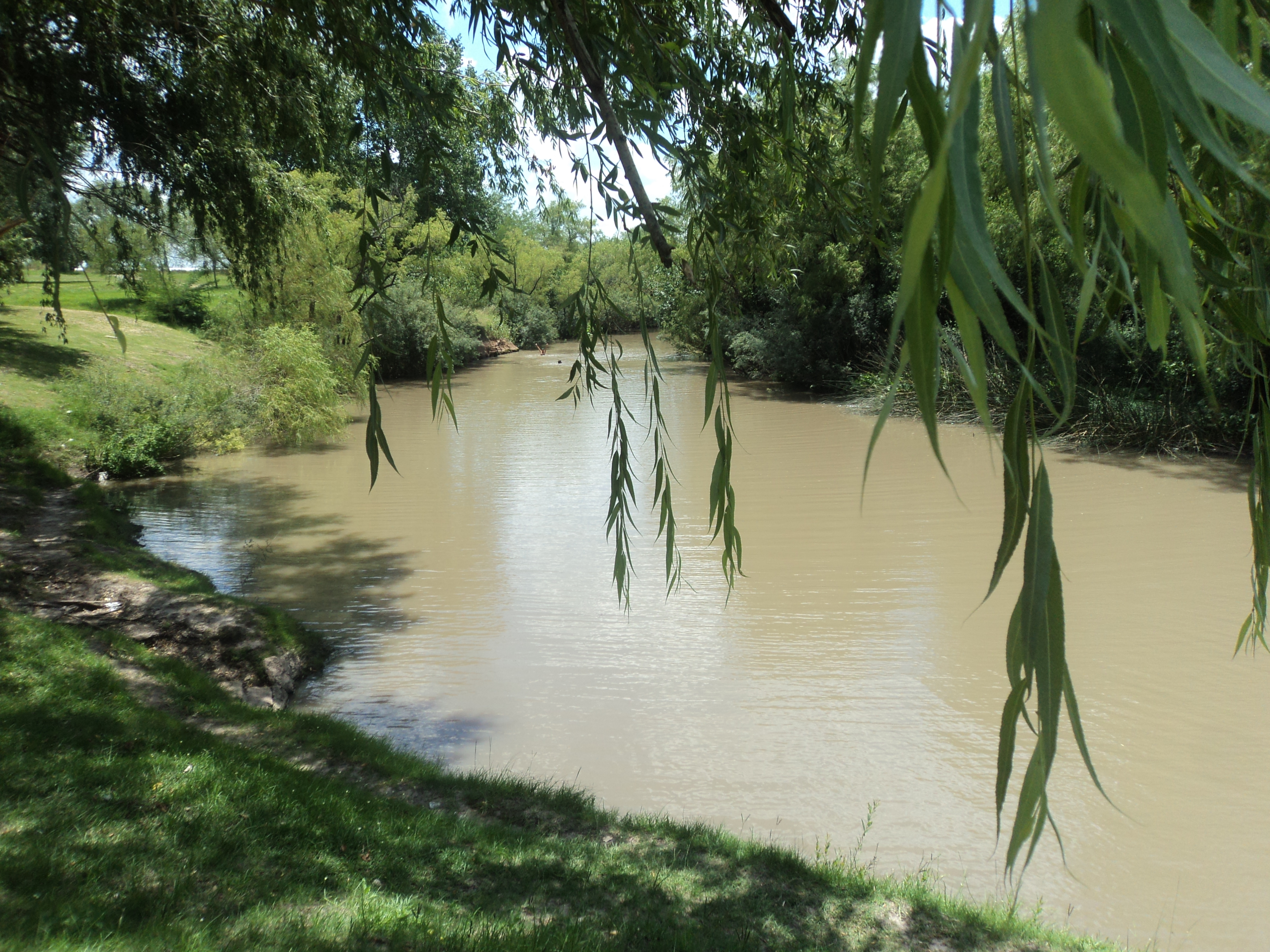 Balneario “La Picadita”. Villa Mantero. Entre Rios. Argentina.